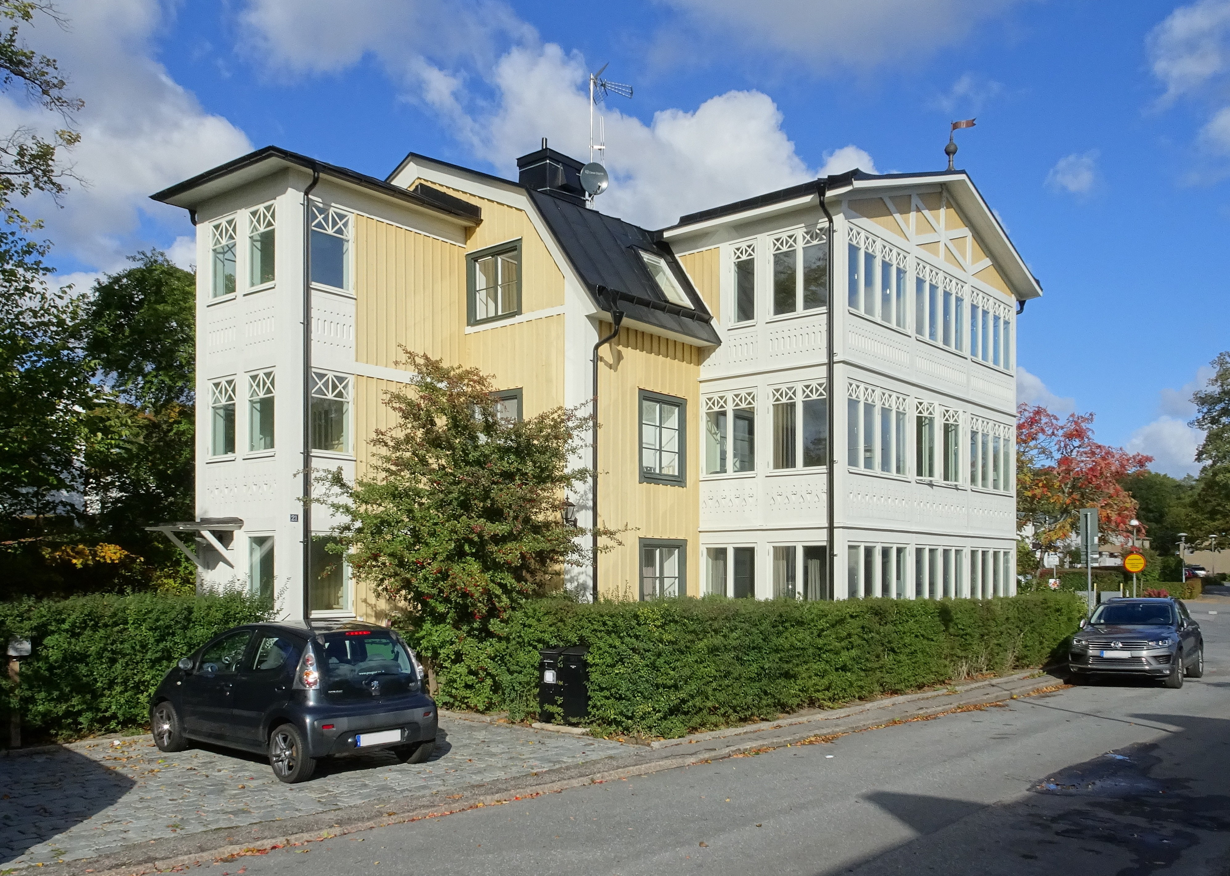 Smedslättens gård, fasaderna mor sydväst